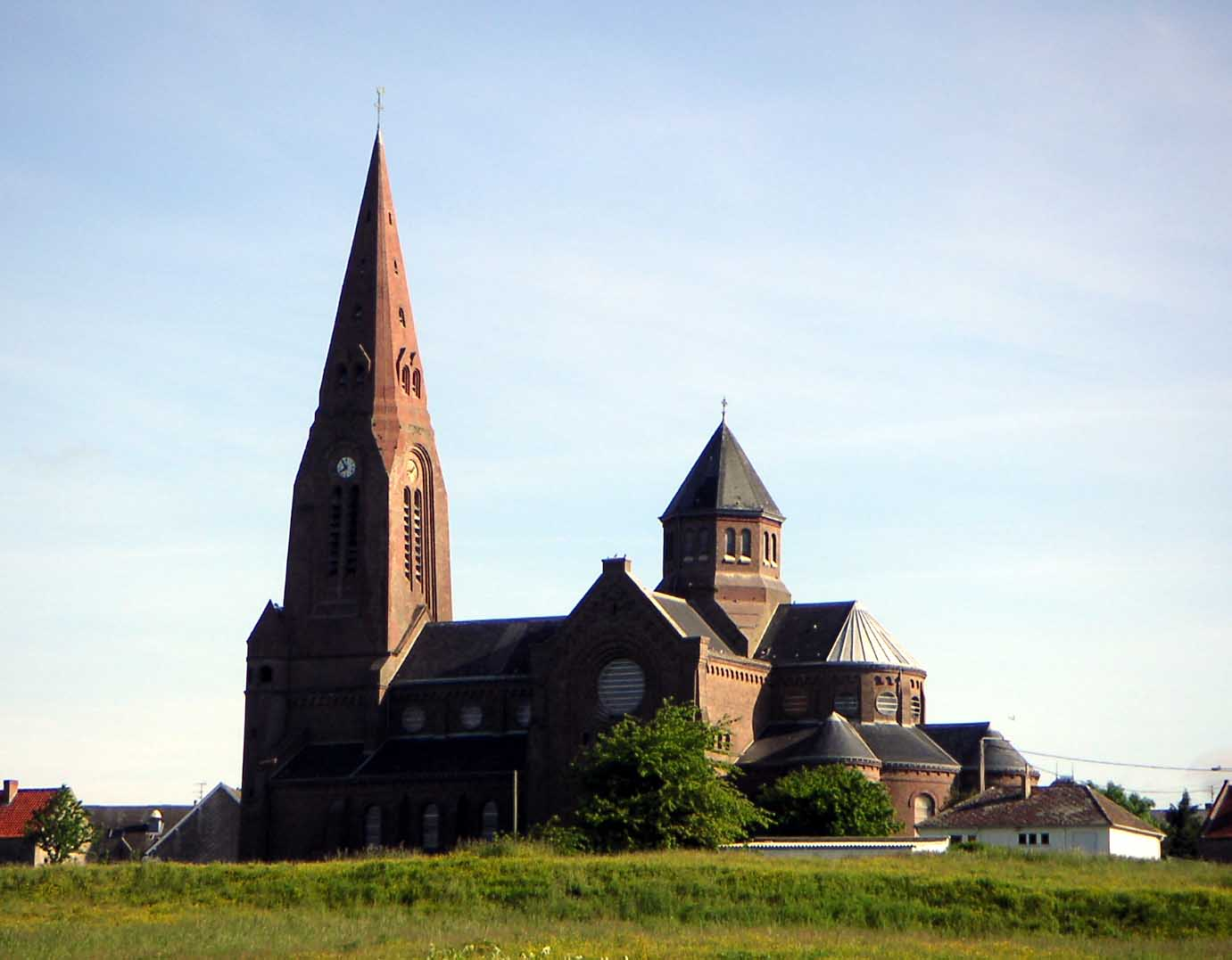 Vue de l'église de Oisy-le-Verger (Pas-de-Calais). Photo prise par Padawane